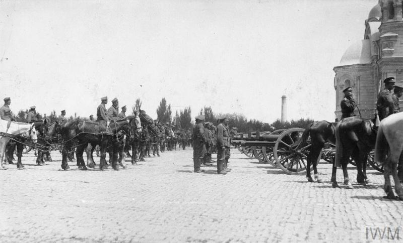 Кавказская кавалерийская часть III Донского корпуса (белые) на параде в честь Дня Святого Георгия в Новочеркасске, 23 апреля 1919 года.